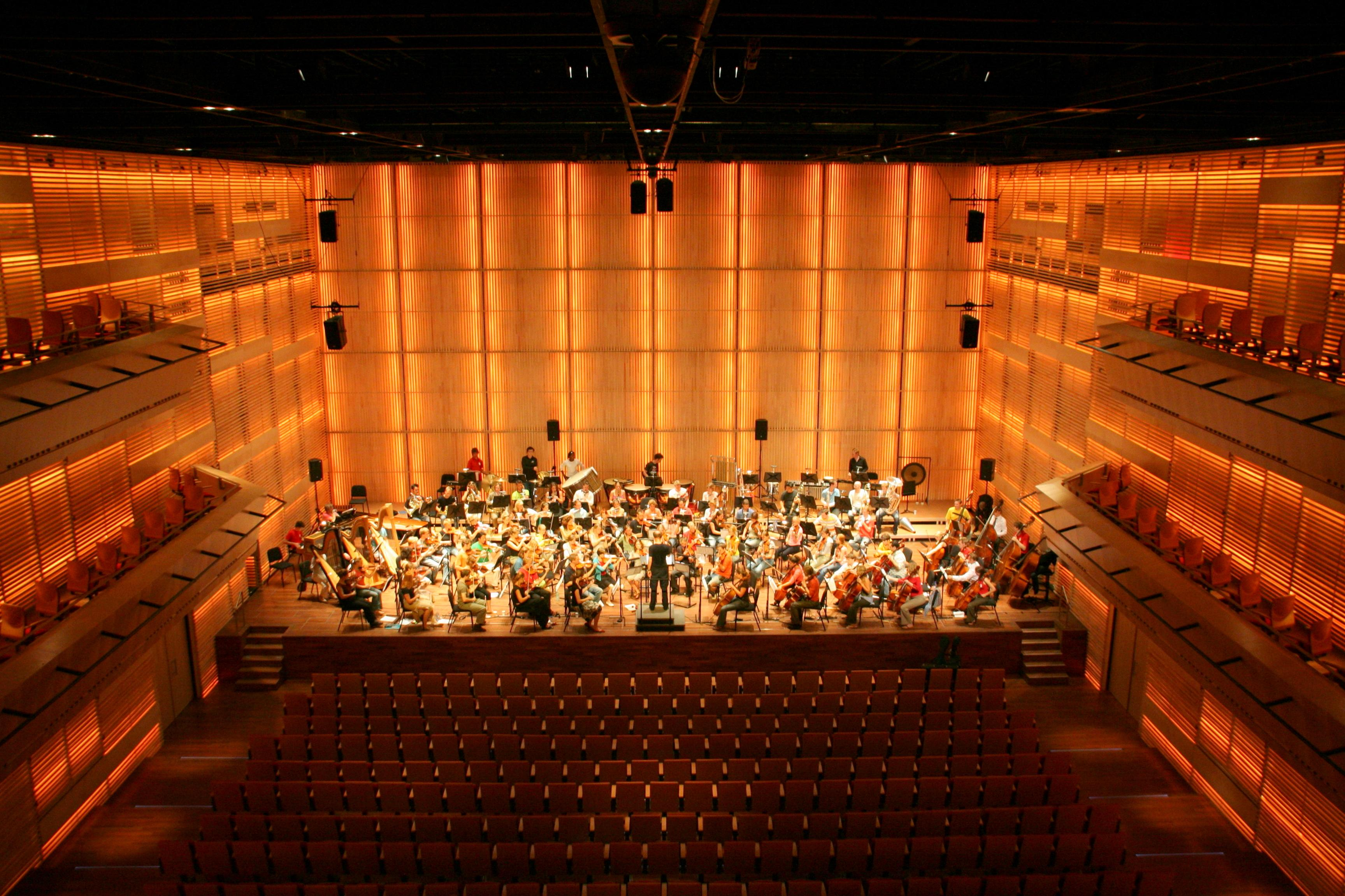 Het interieur van de grote zaal van het Muziekgebouw aan 't IJ in Amsterdam, tijdens een zaalrepetitie. Eigen foto.